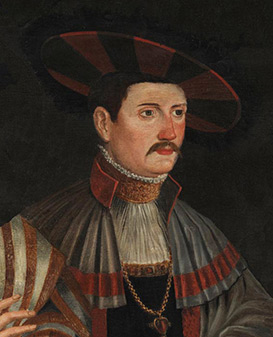 Portret Ruprecht van Palts-Veldenz